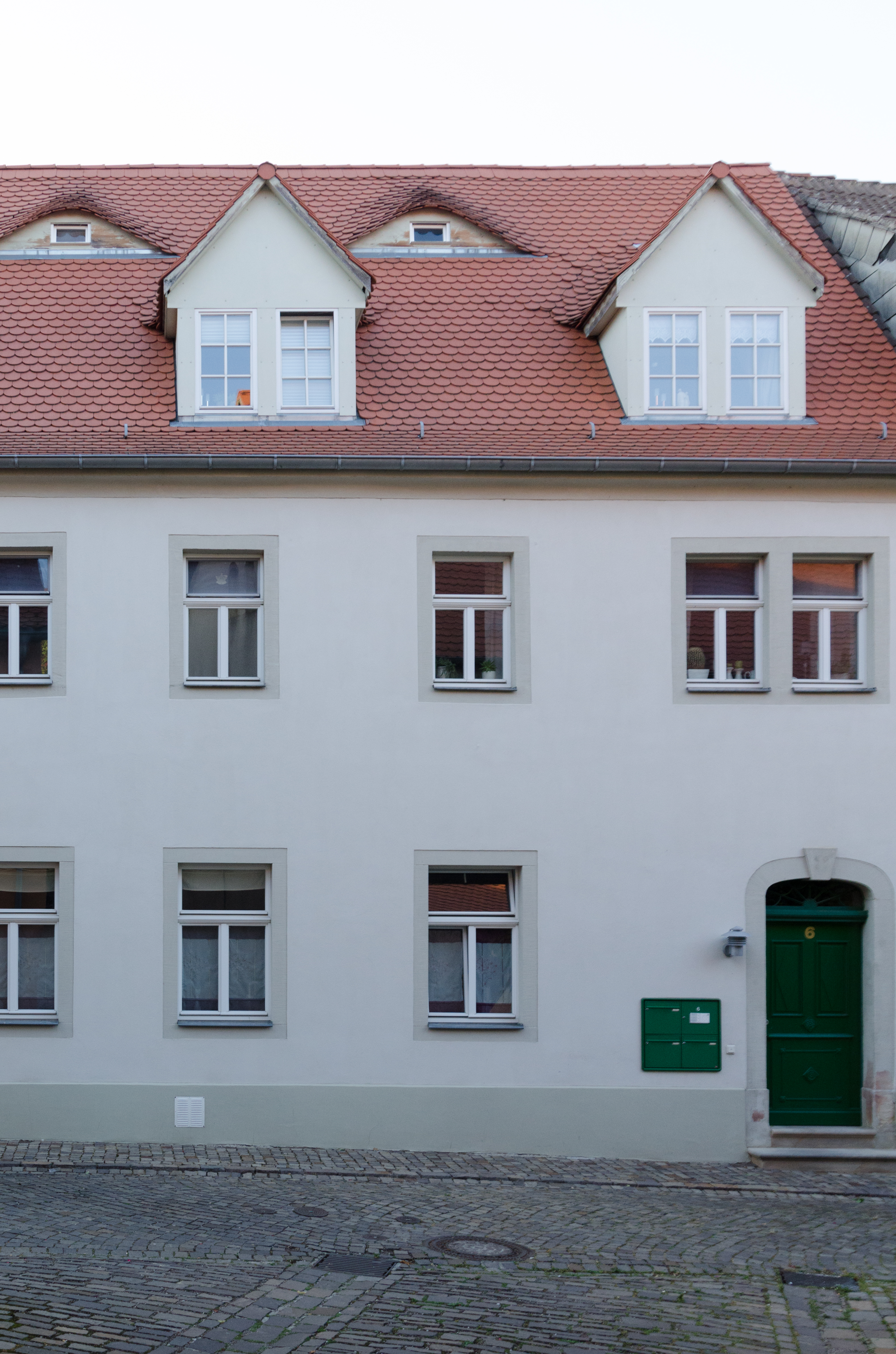 Querfurt, Burgstraße 6